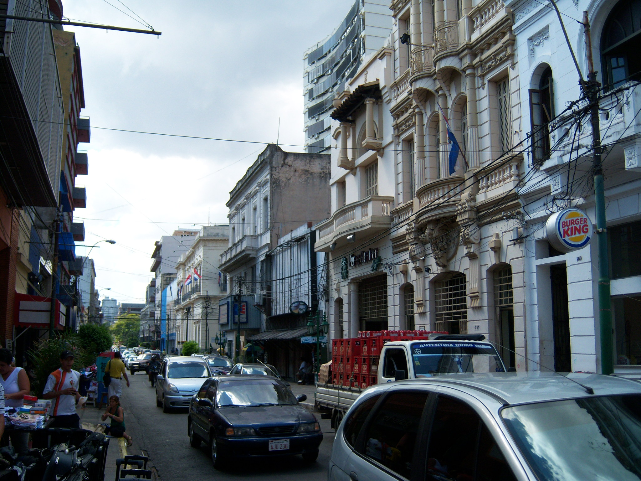 Calle Palma en Asunción.